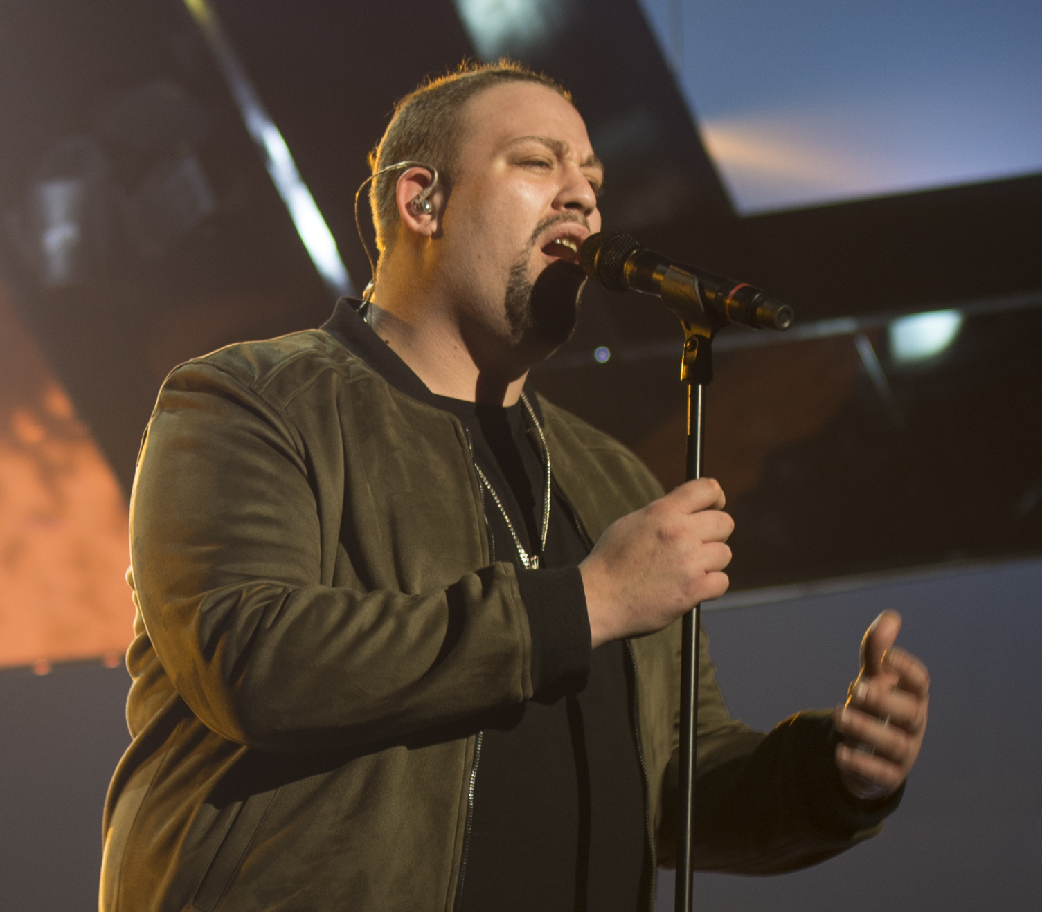 Nano på en repetition under första deltävlingen av Melodifestivalen 2017 i Göteborg.